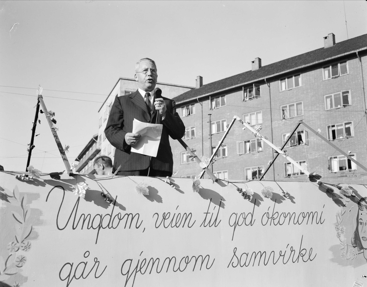 Ukjent mann holder tale på arrangement for Oslo samvirkelag, Advokat Dehlis plass 15. mars 1949